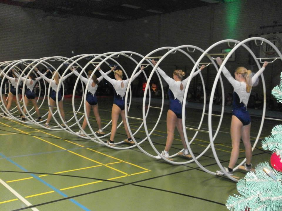 LDT Bochum